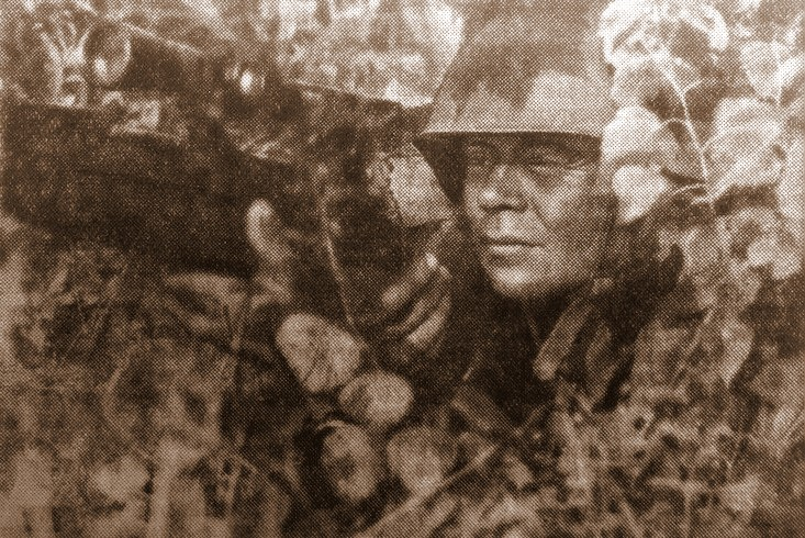 Начальник снайперской команды 125-го стрелкового полка лейтенант Г.Л. Вежневец - лучший стрелок 6-й стрелковой дивизии. Фотография опубликована в газете "Правда" 30 июля 1941 года. Григорий Леонтьевич Вежневец, 1912 г.р., уроженец деревни Протасы ныне Протасовского сельсовета Октябрьского района Гомельской области Белоруссии. Пропал без вести в 1941 году